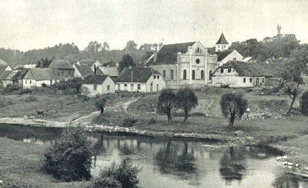 Sabile, vaade linnusekohale lõunast üle Abava jõe XIX/XX sajandi vahetusel.